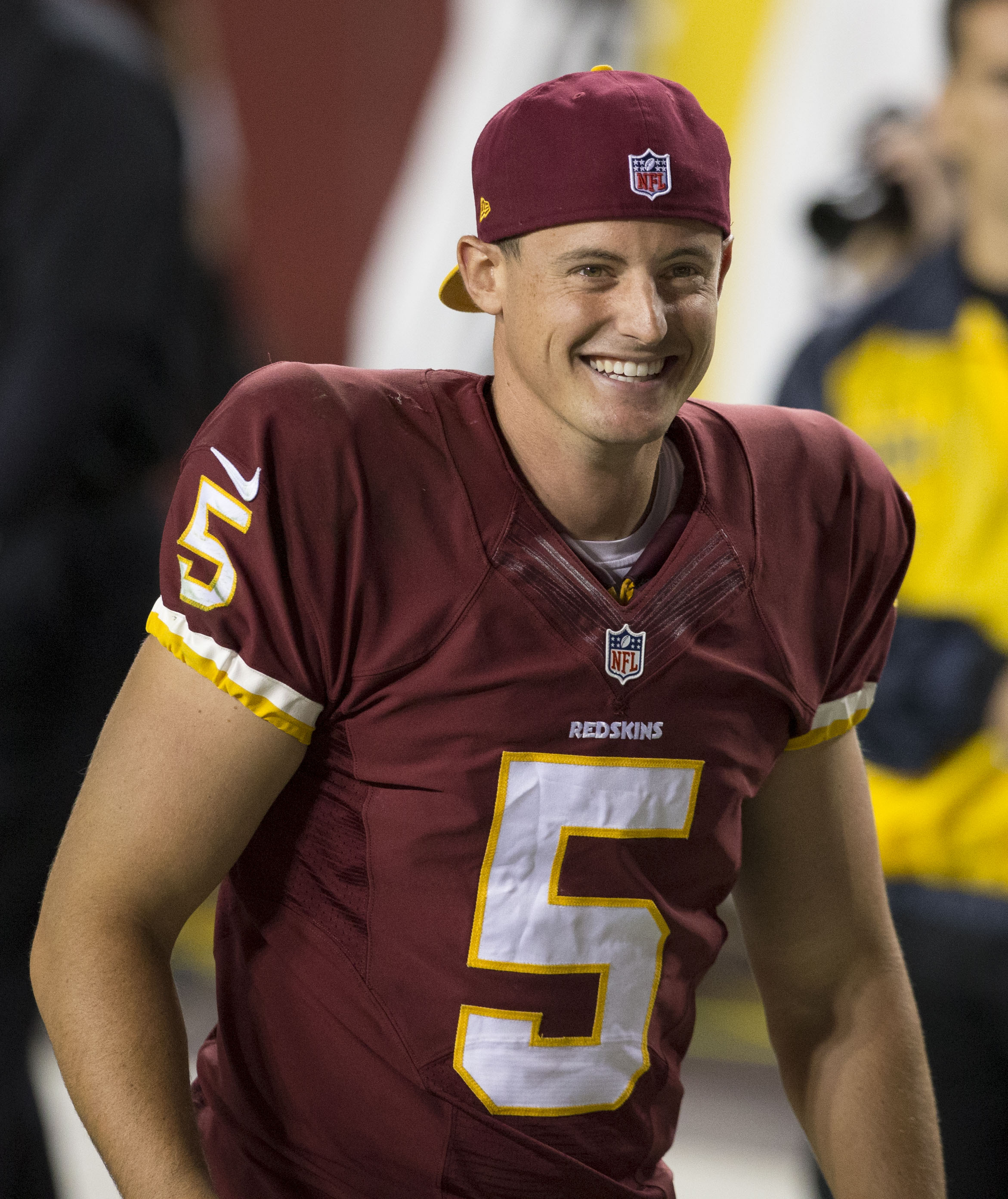 Giants at Redskins 9/25/14